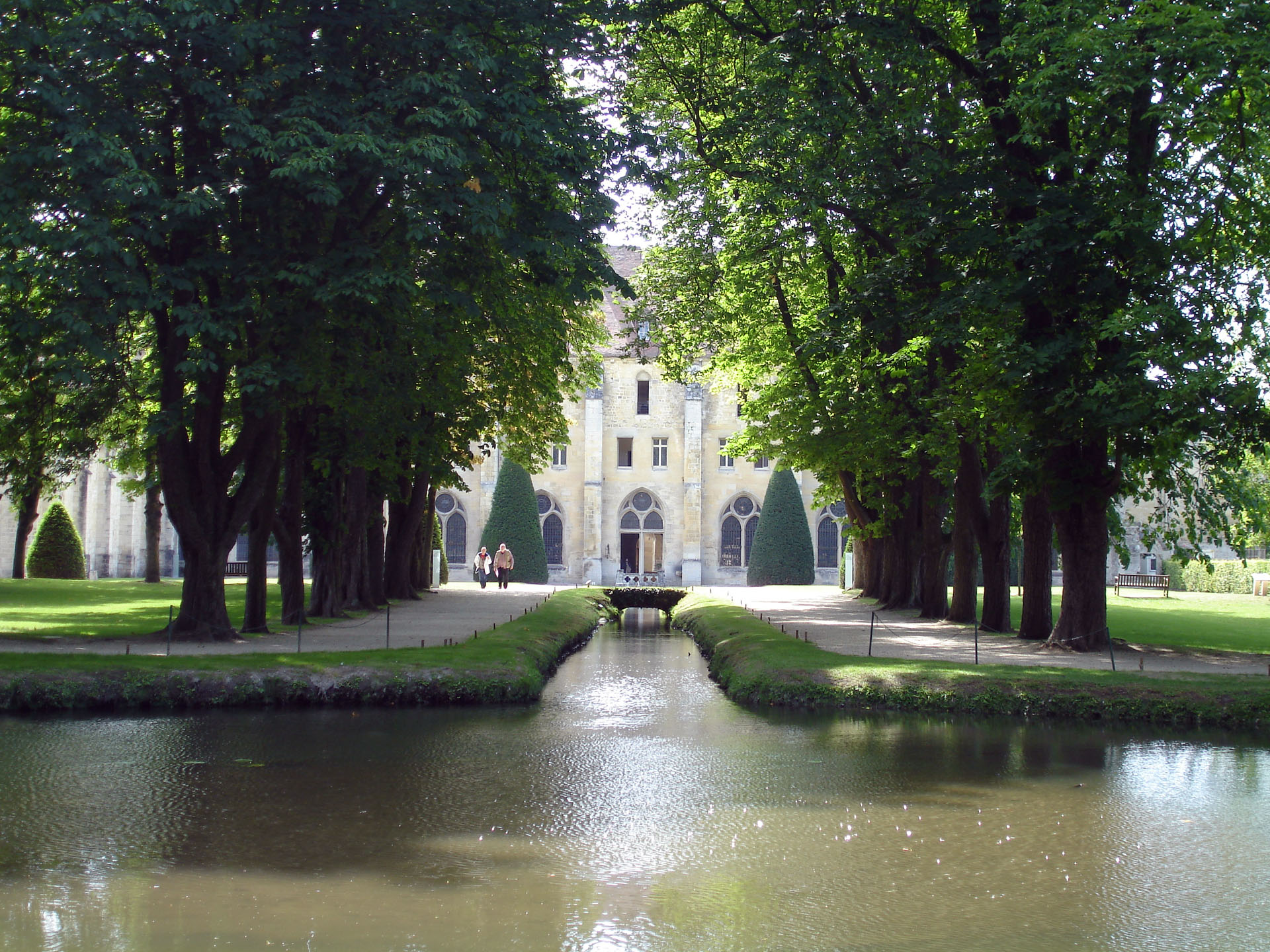 Le canal et le bâtiment des moines de l'abbaye de Royaumont, Val-d'Oise, France.